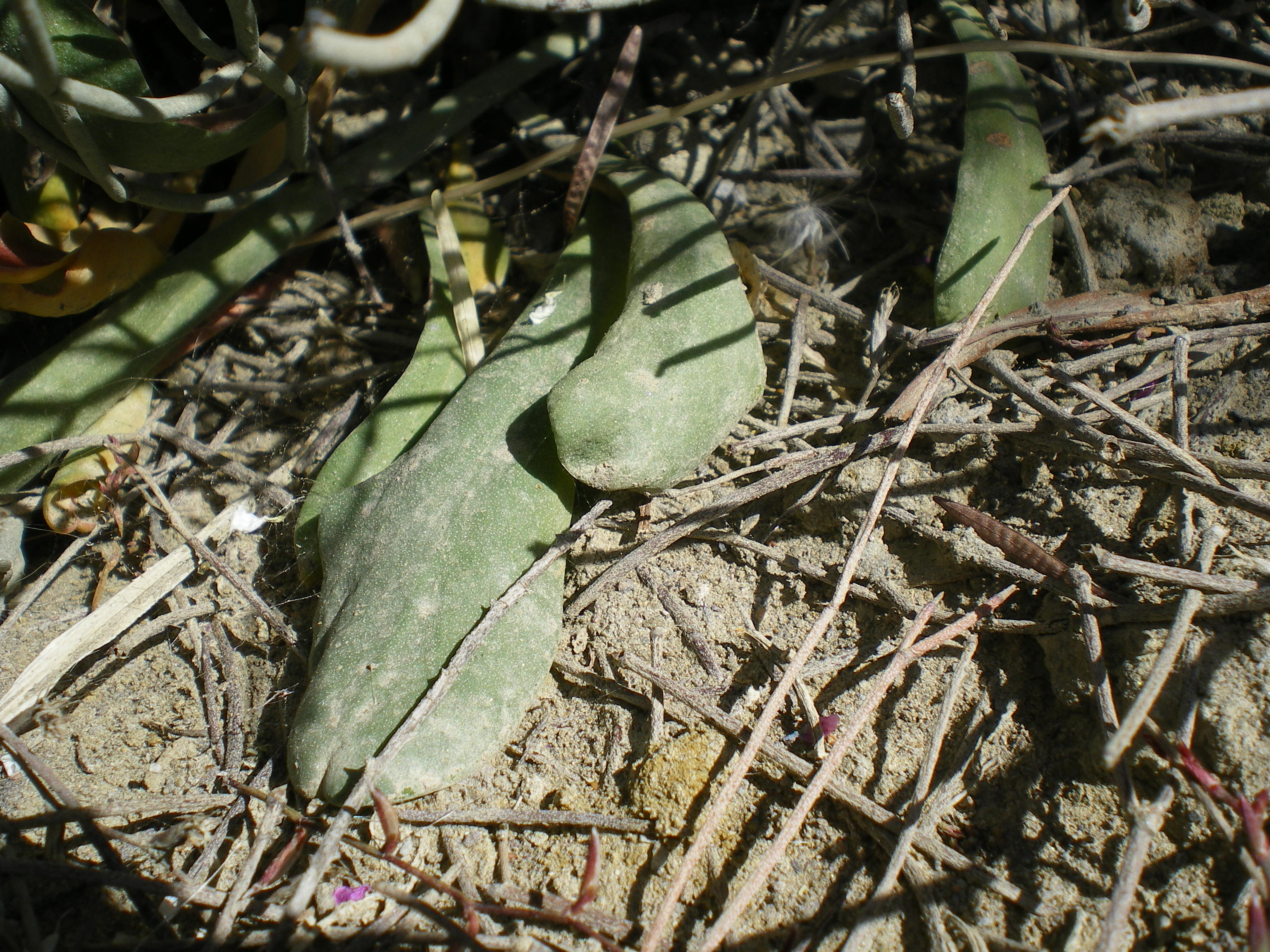 Fotografía de hojas basales de Limonium insigne, planta perenne de la familia de las Plumbagináceas, tomada en el subdesierto de Tabernas, provincia de Almería, España.